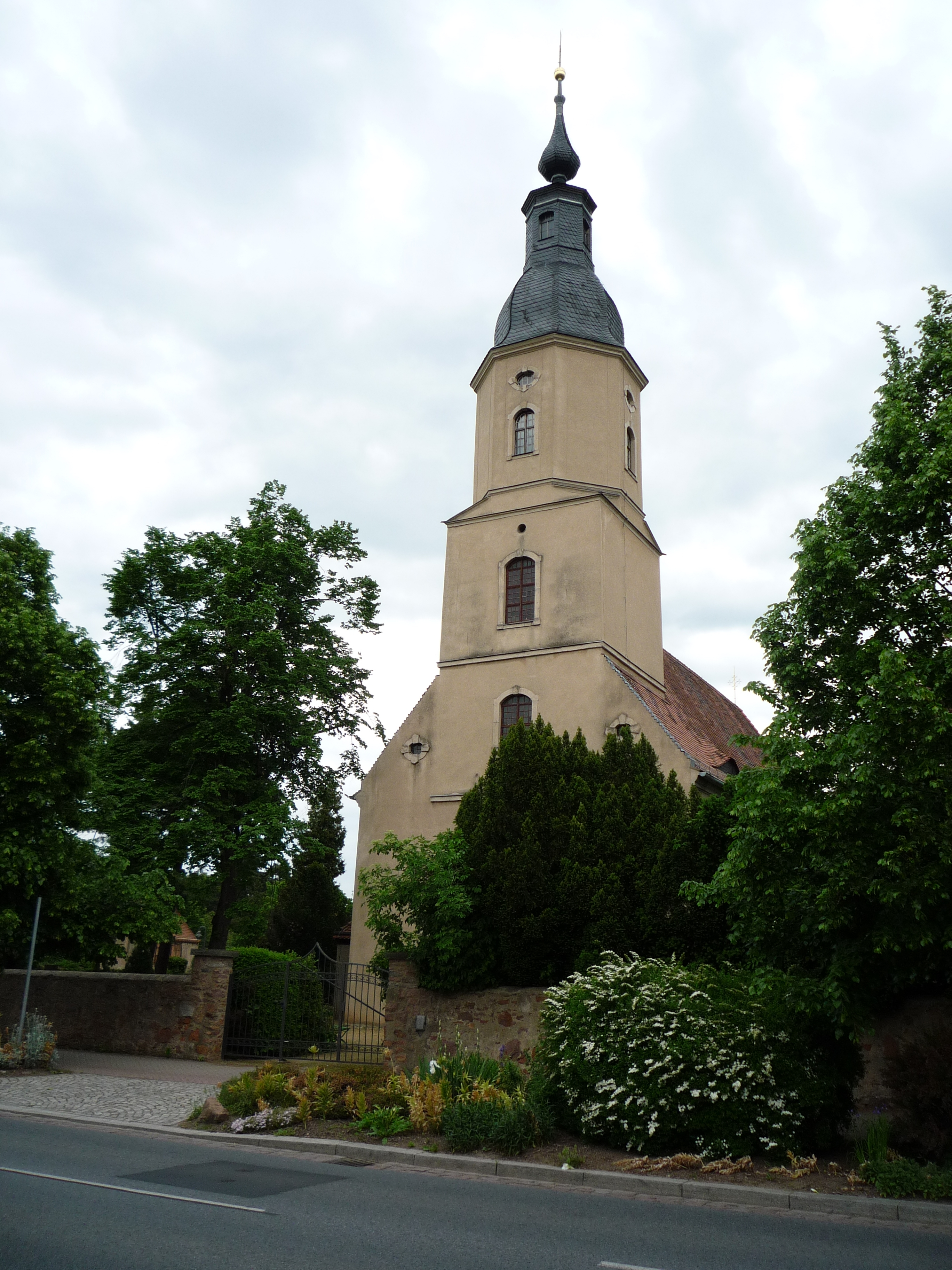 Die St.-Urban-Kirche im Meißener Stadtteil Cölln, gesehen von der Dresdener Straße